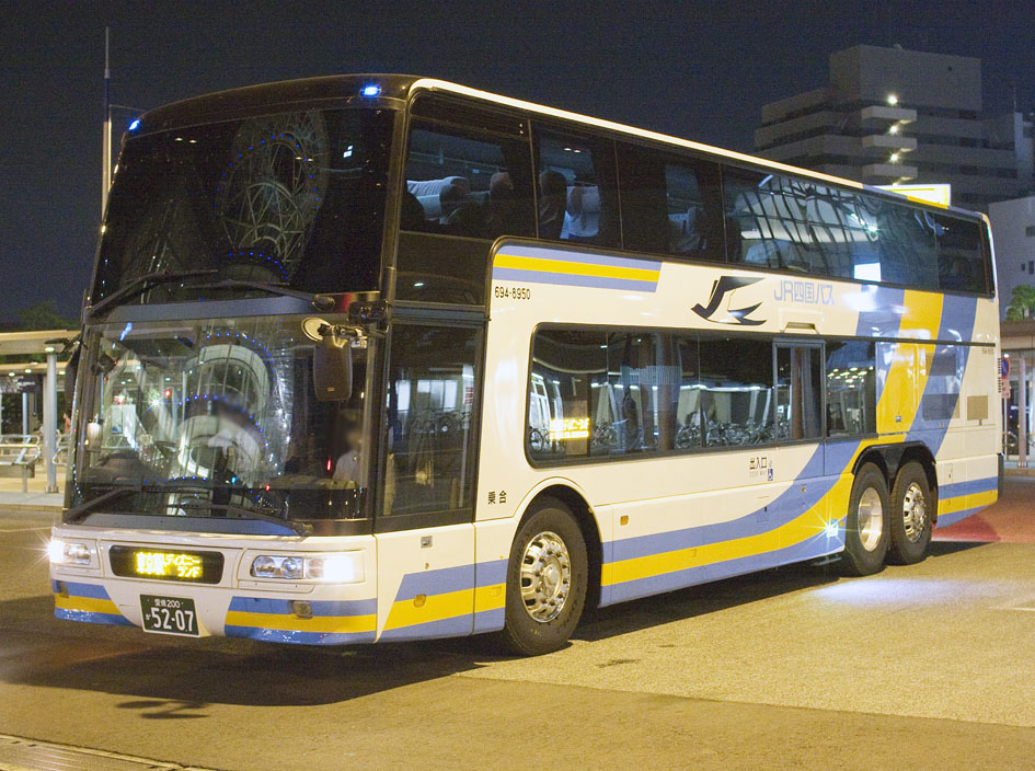 JR四国バス エアロキング BKG-MU66JS